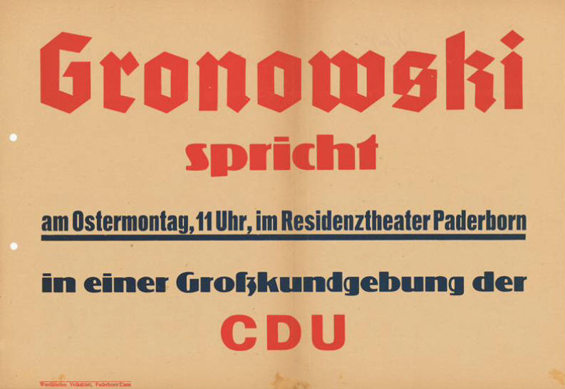 Gronowski spricht ... in einer Großkundgebung der CDUPlakatart:AnkündigungsplakatDrucker_Druckart_Druckort:Westfälisches Volksblatt, Paderborn/ElsenObjekt-Signatur:10-009 : 66Bestand:Landtagswahlplakate Nordrhein-Westfalen (10-009)GliederungBestand10-18:Landtagswahlplakate Nordrhein-Westfalen (10-009) » Landtagswahl am 20.4.1947 » CDU » AnkündigungsplakateLizenz:KAS/ACDP 10-009 : 66 CC-BY-SA 3.0 DE